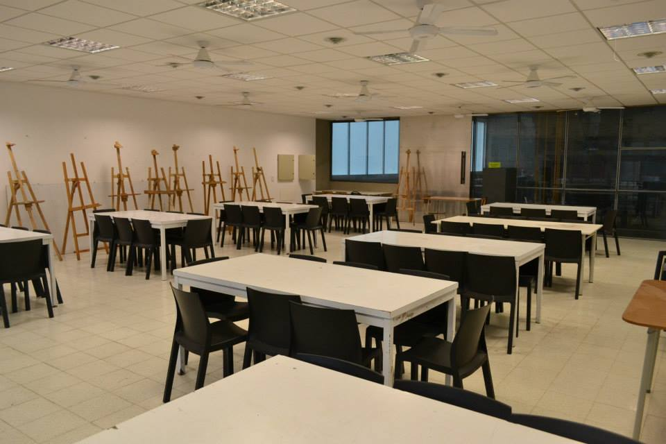 Facultad de Humanidades y Artes (aula)